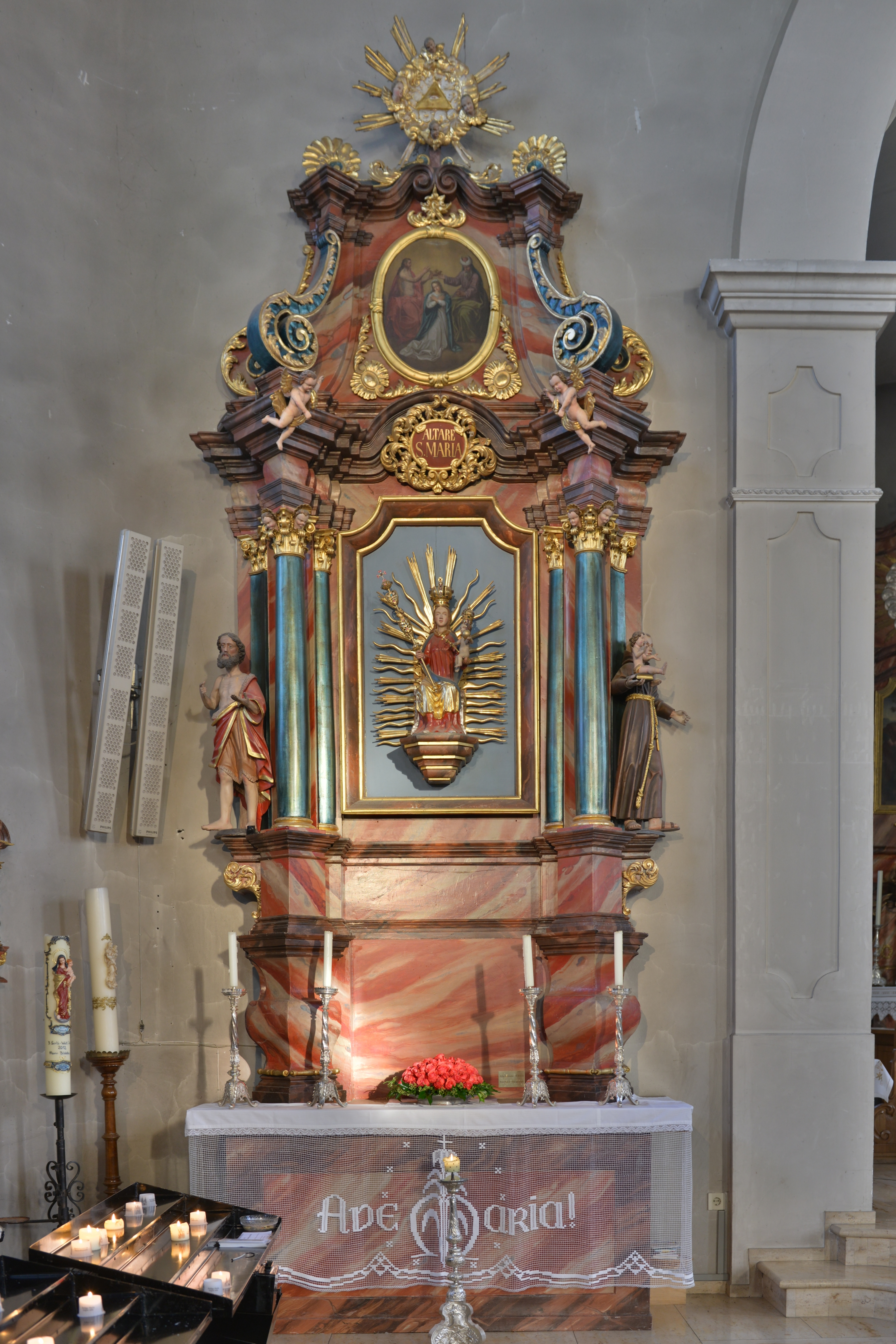 Bildstein , Wallfahrtskirche Mariä Heimsuchung